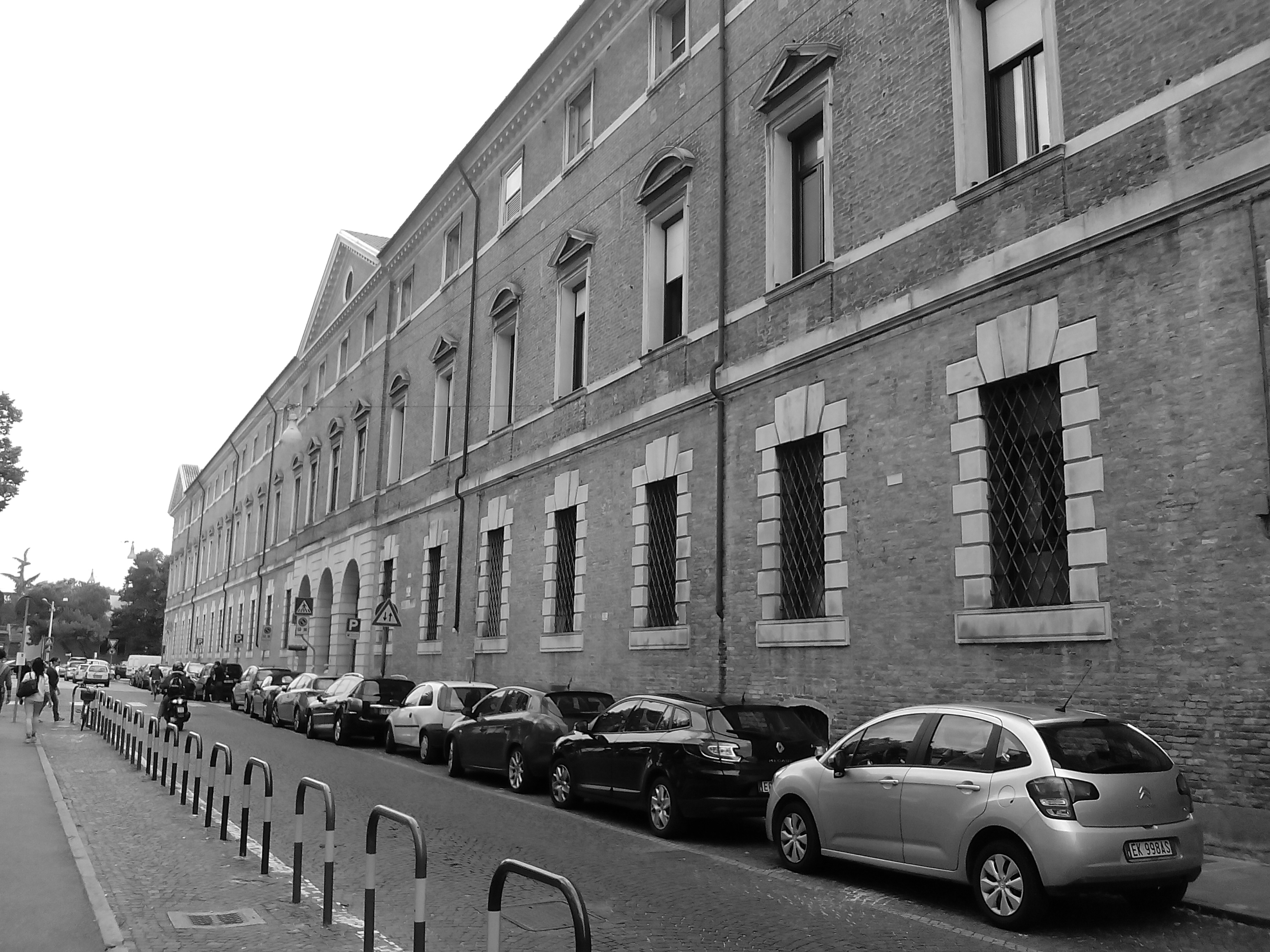 Ospedale Giustinianeo This is a photo of a monument which is part of cultural heritage of Italy.